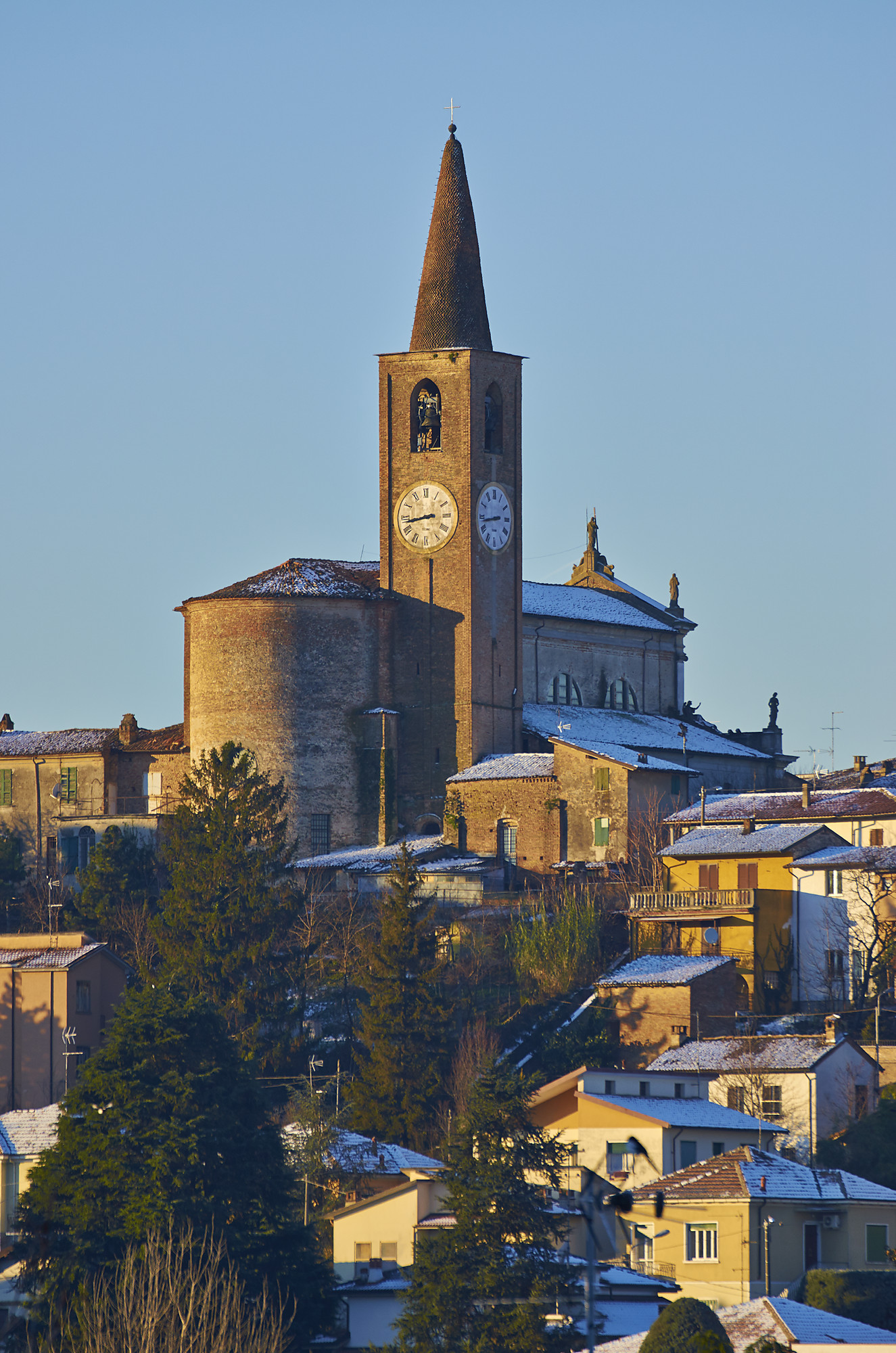 Chiesa di San Pietro Apostolo